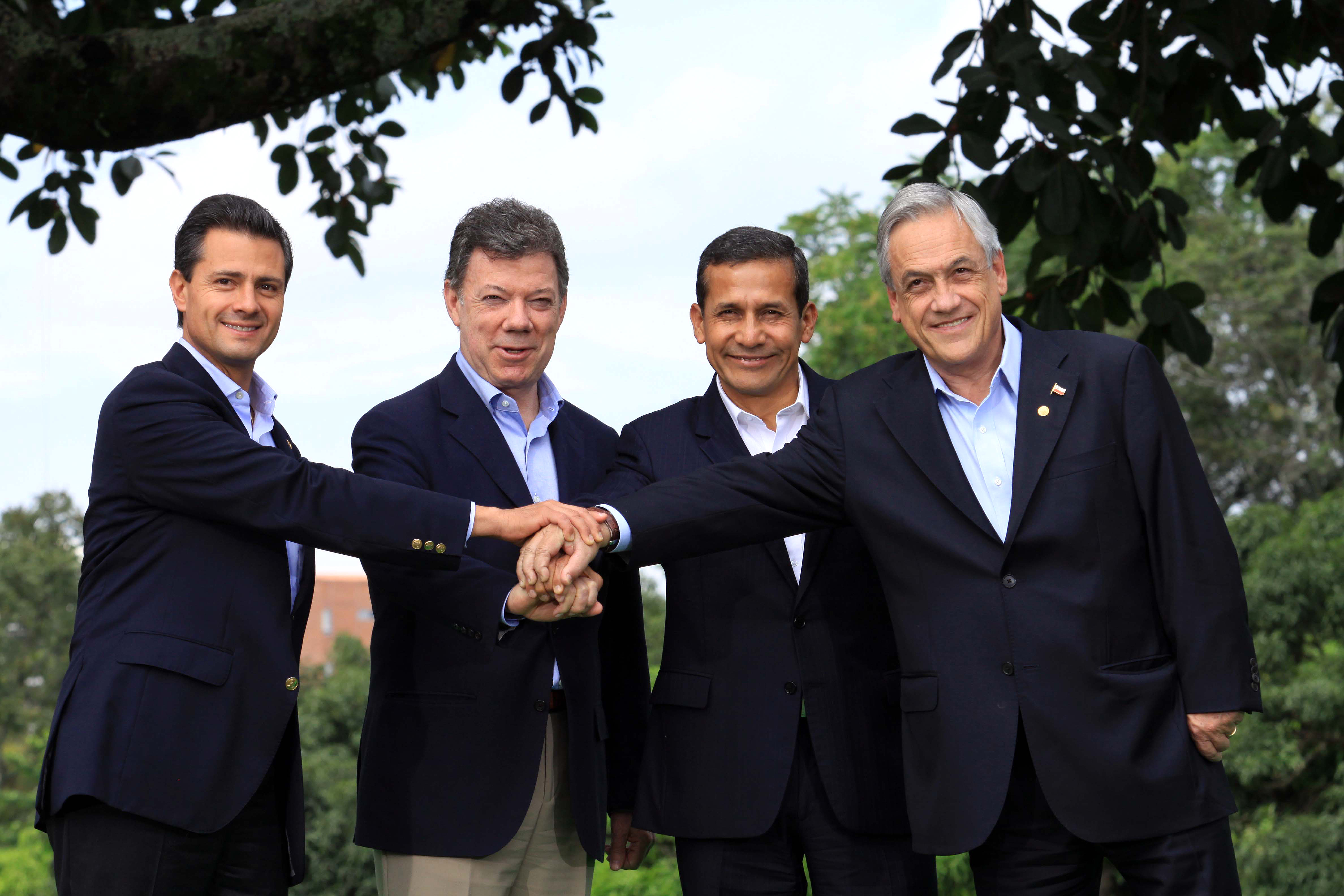 Almuerzo de los Presidentes de los países miembros y observadores. Cali, Colombia.